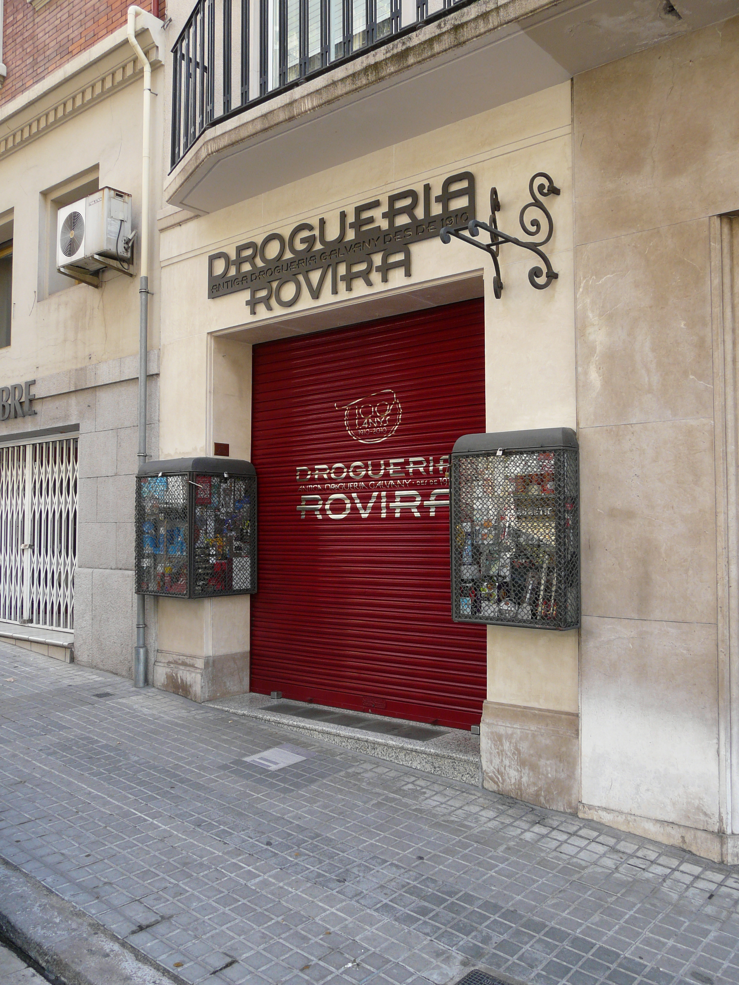 Drogueria Rovira. C. Madrazo, 127 (Barcelona) 09″ N, 2° 08′ 41.21″ E